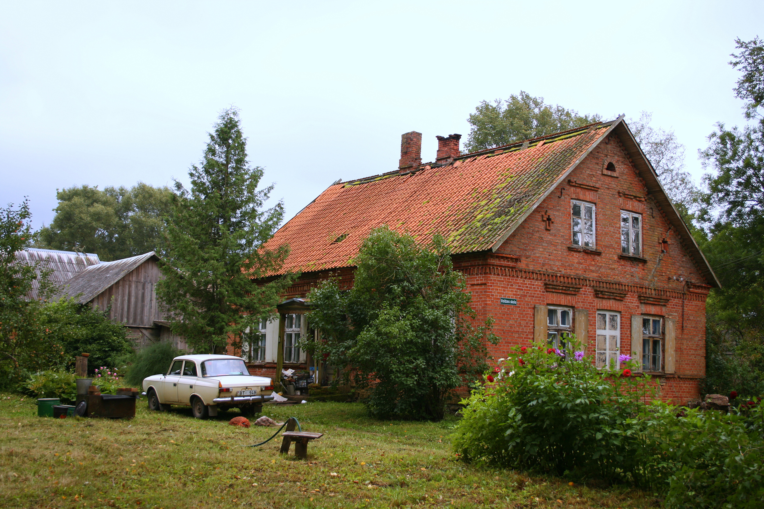 Veldzes skola